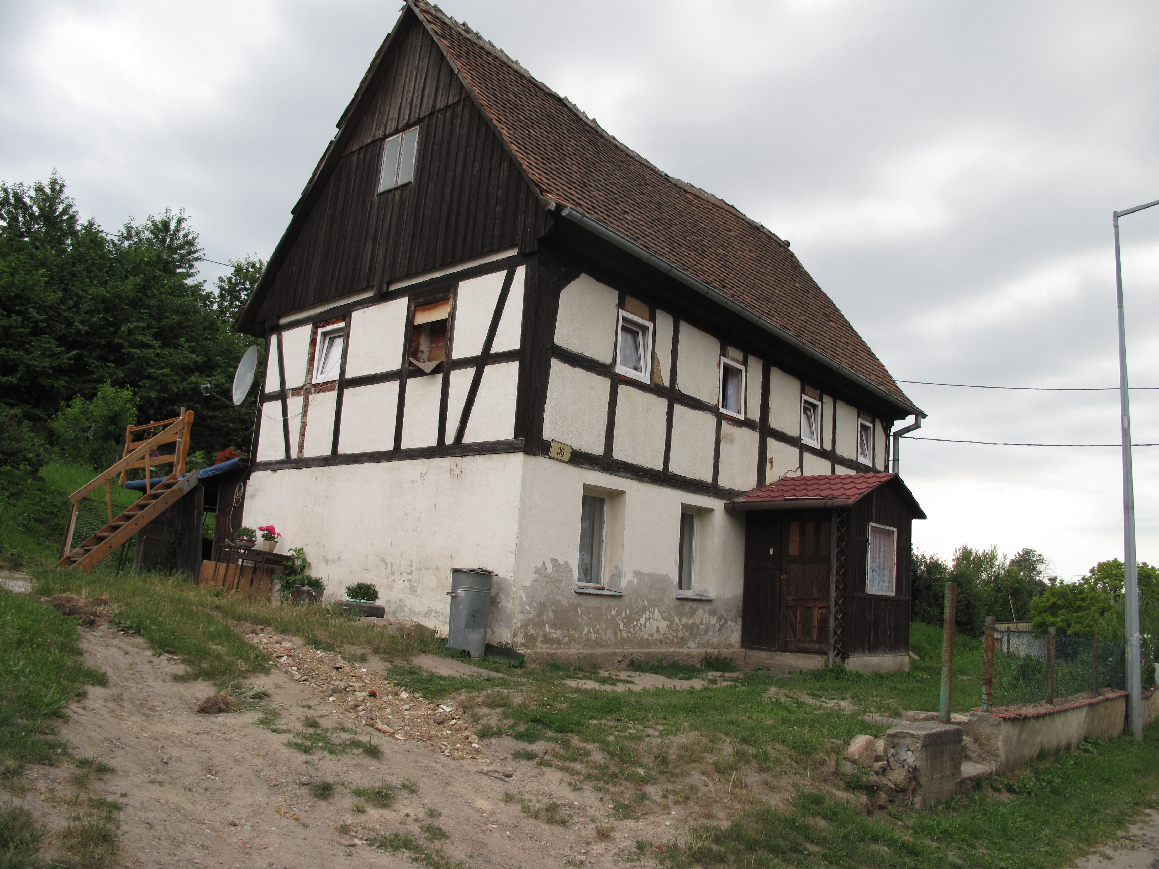 Posada (województwo dolnośląskie). Polska.